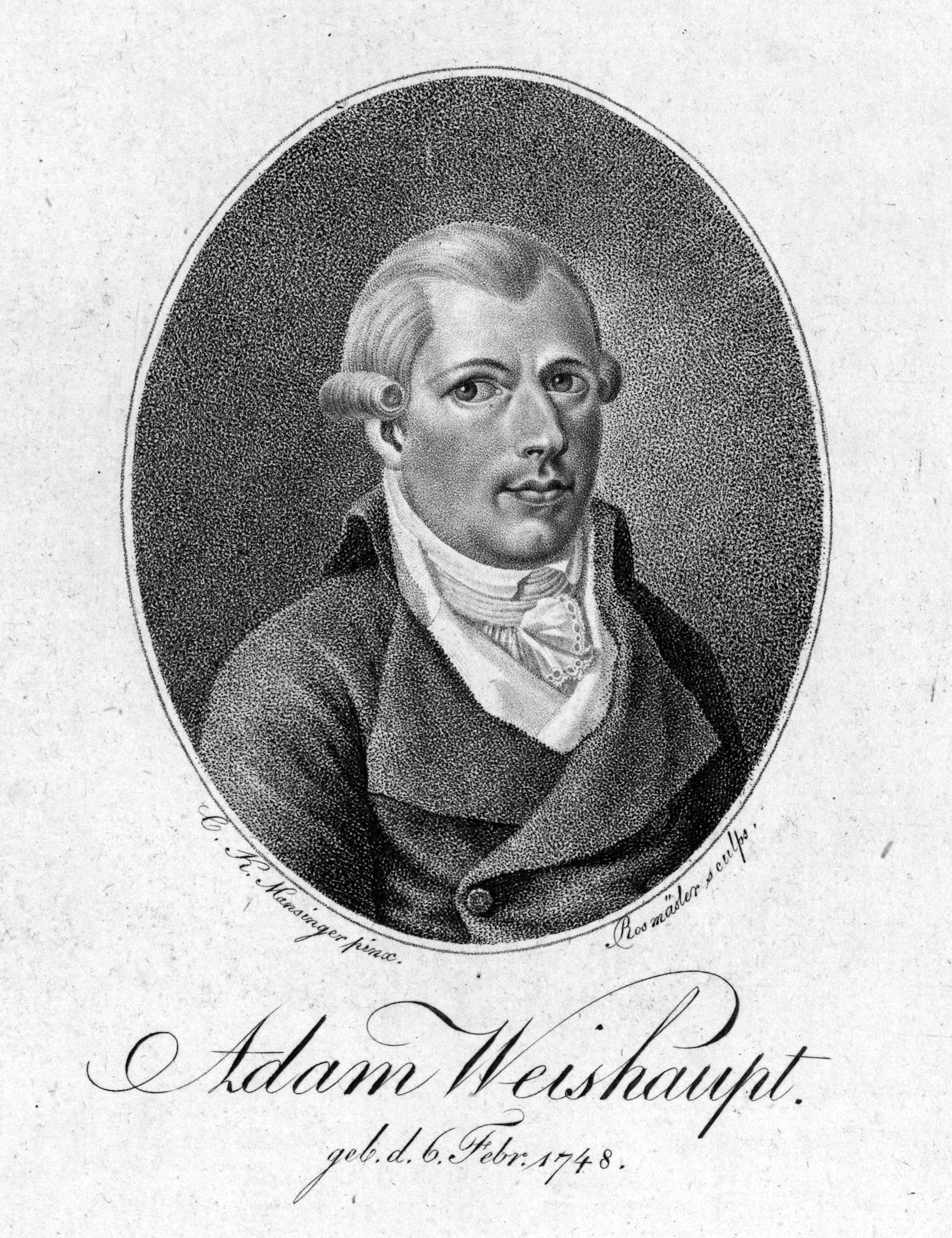 Portrait of Adam Weishaupt (1748-1830)